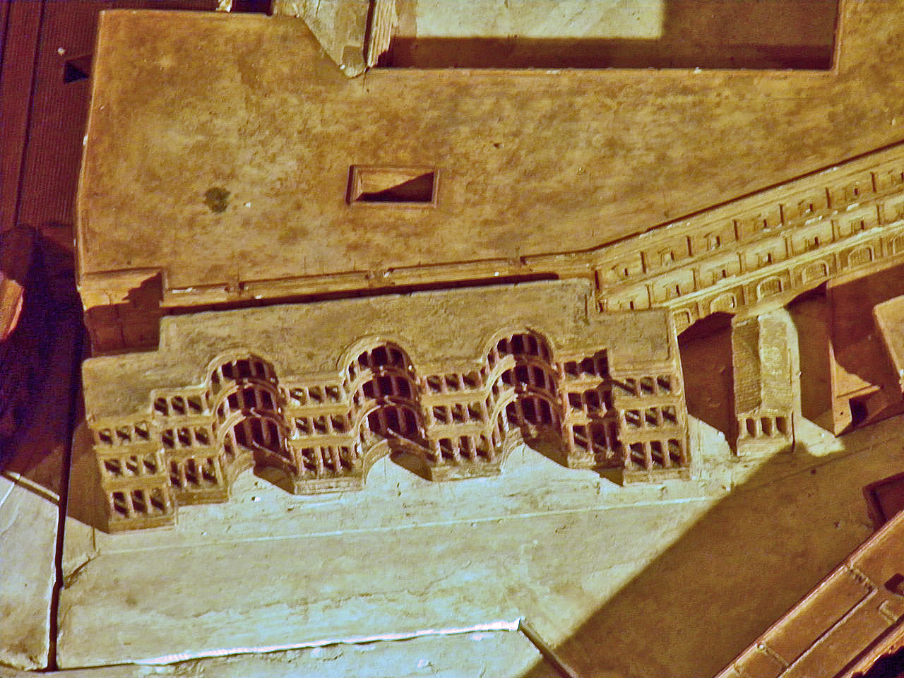 Septizodium, plan de Rome de Paul Bigot, université de Caen MRSH